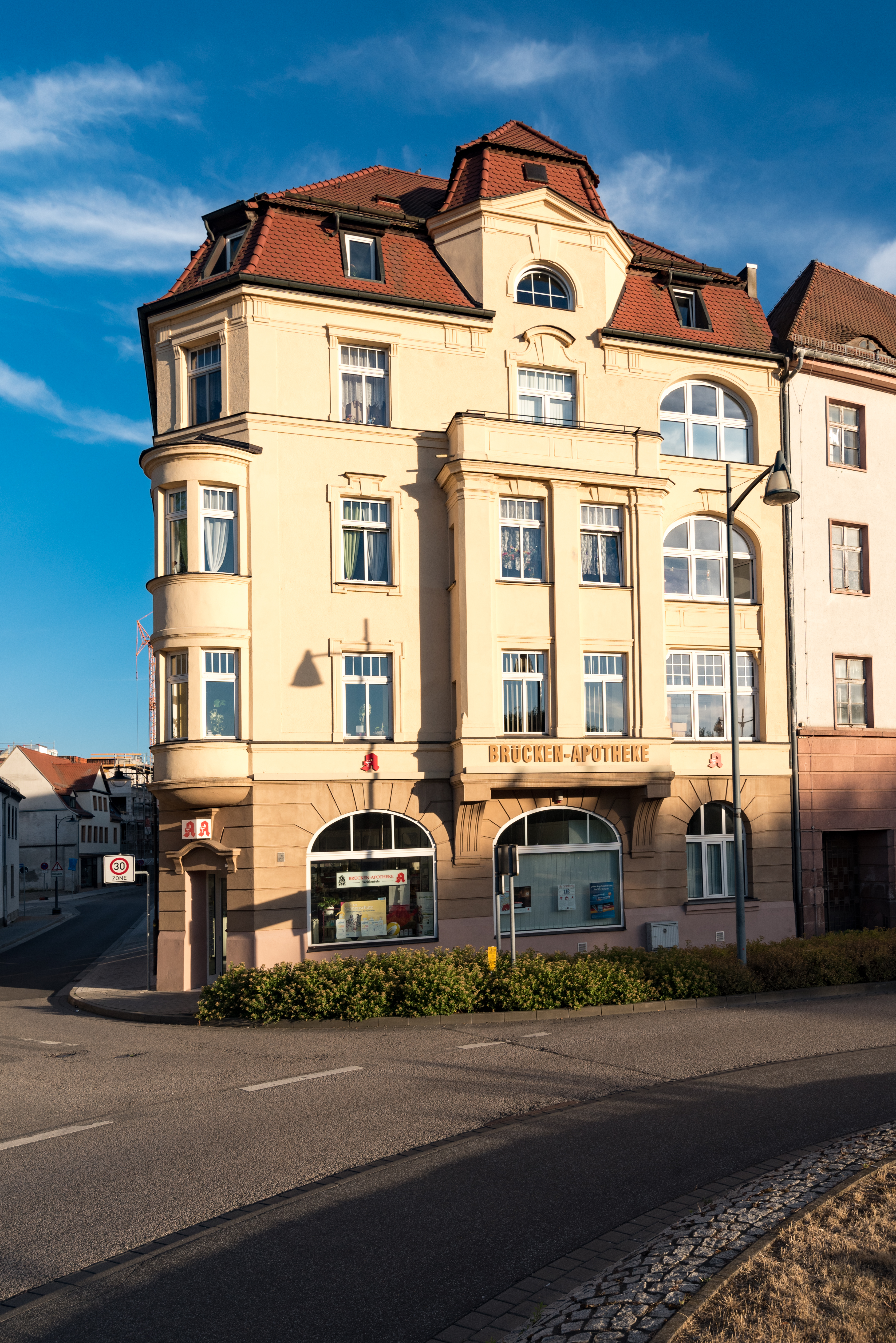 Weißenfels, Saalstraße 42